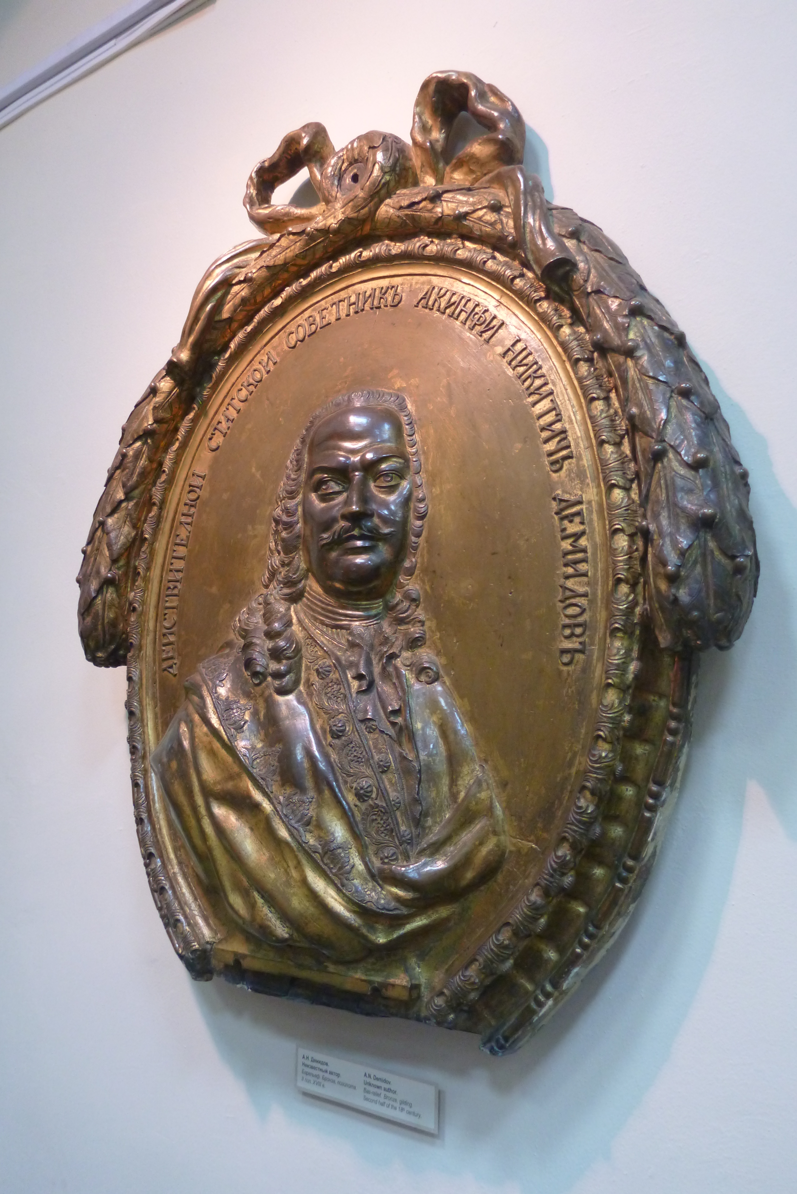 Бронзовый барельеф Акинфия Никитича Демидова из музея Горнозаводской Урал. Барельеф выполнен в XVIII веке. Фото 2019 года